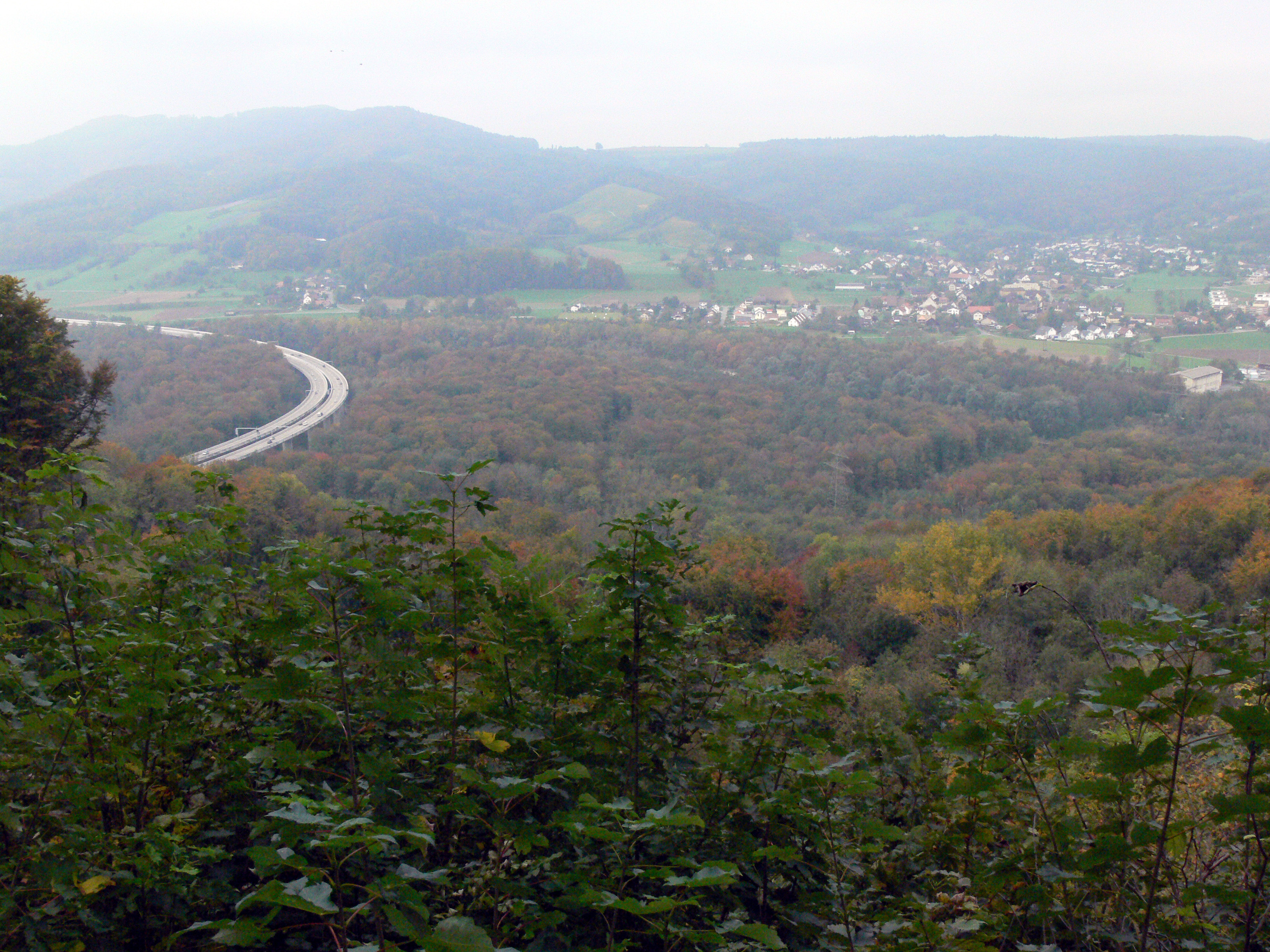 Habsburg. Ausblick.